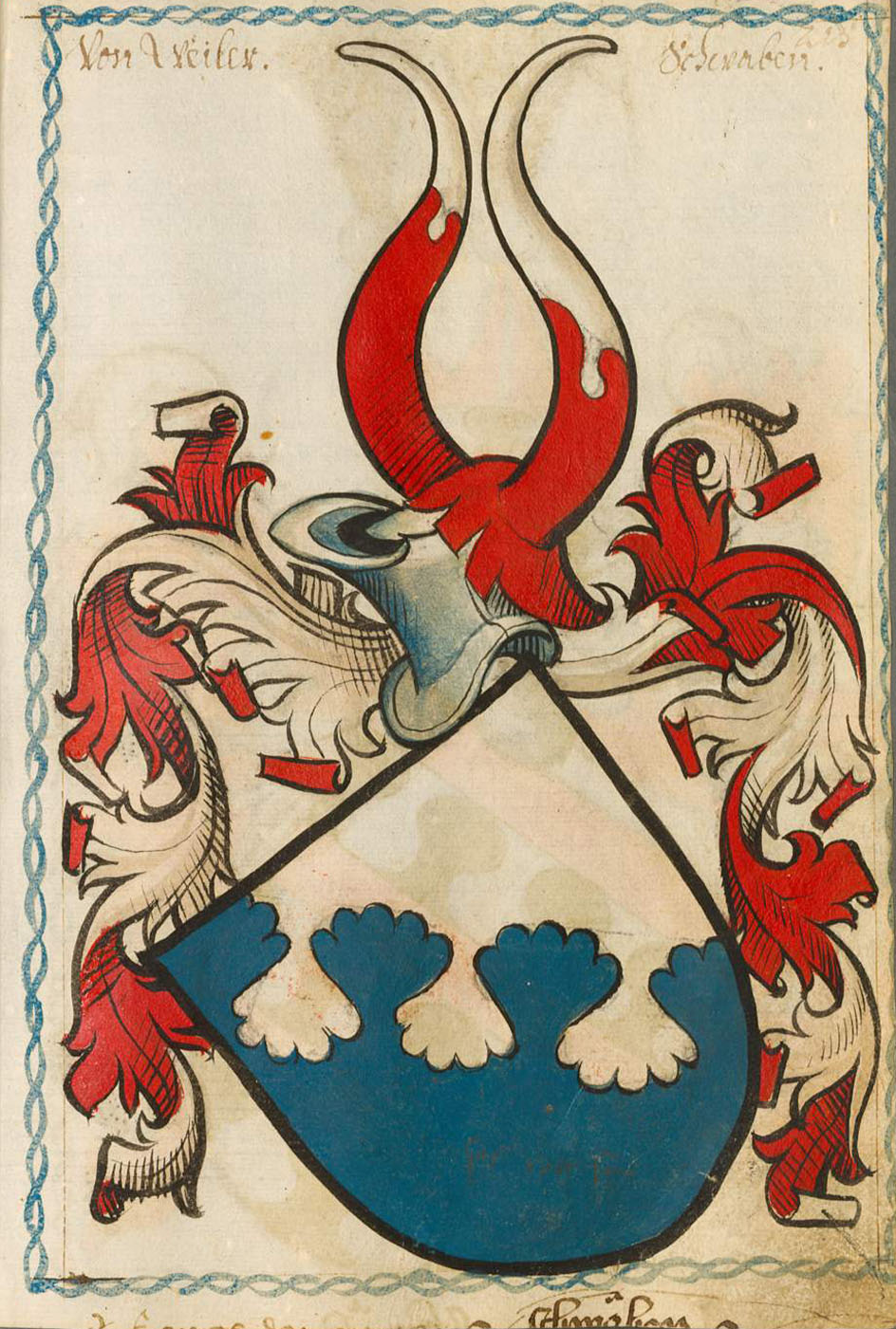 Scheibler'sches Wappenbuch, älterer Teil; Seite 215 Von Weiler Schwaben